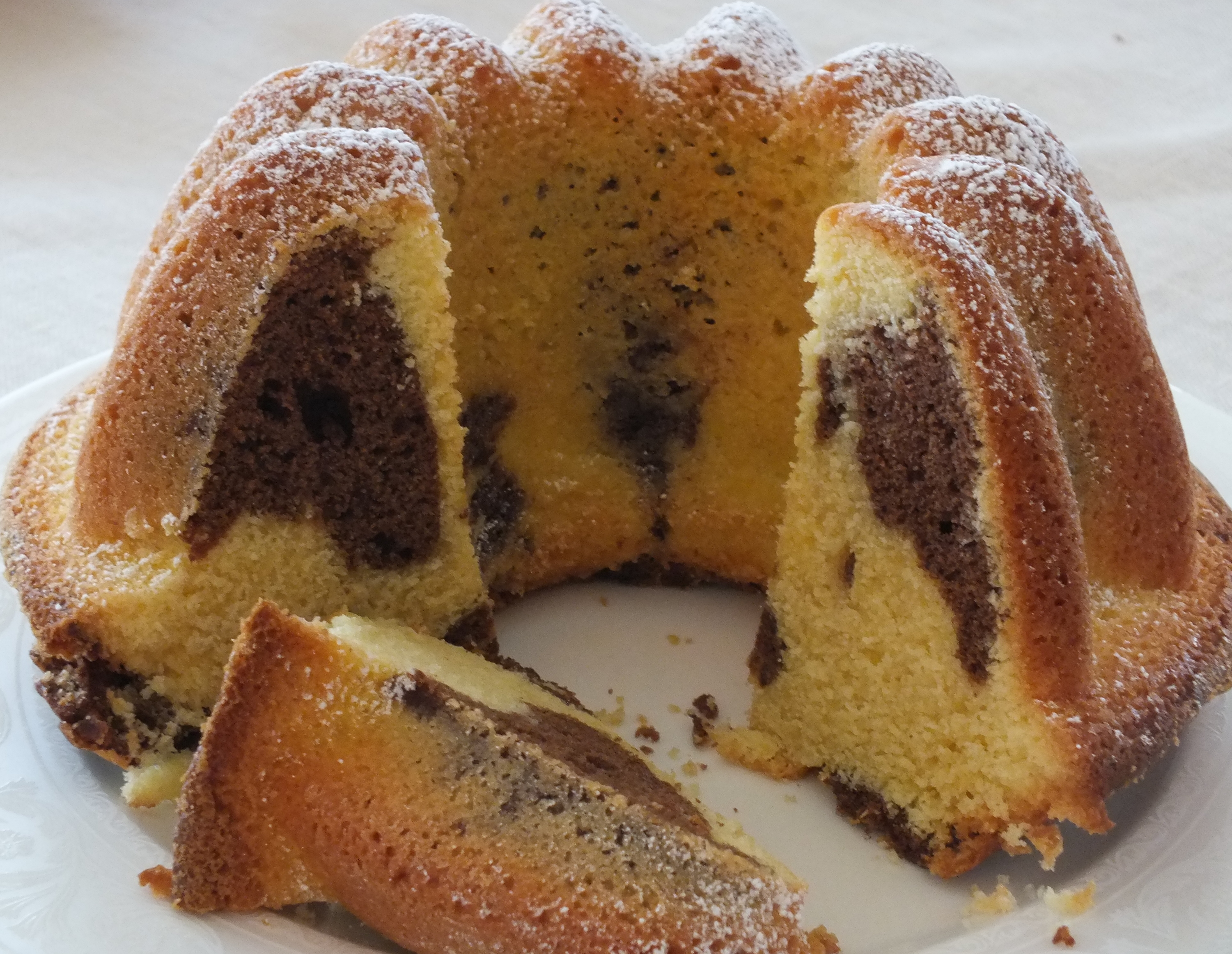 Babka piaskowa kakaowa - babka marmurkowa